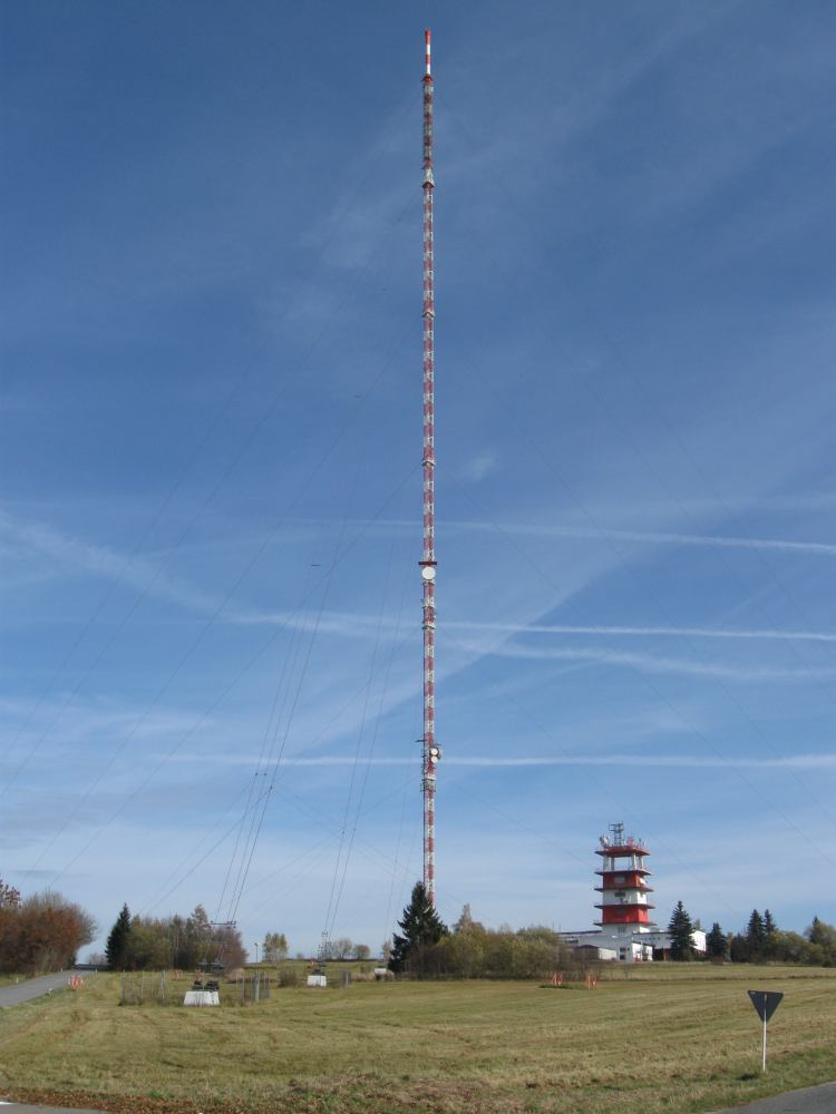 Vysílač Kojál